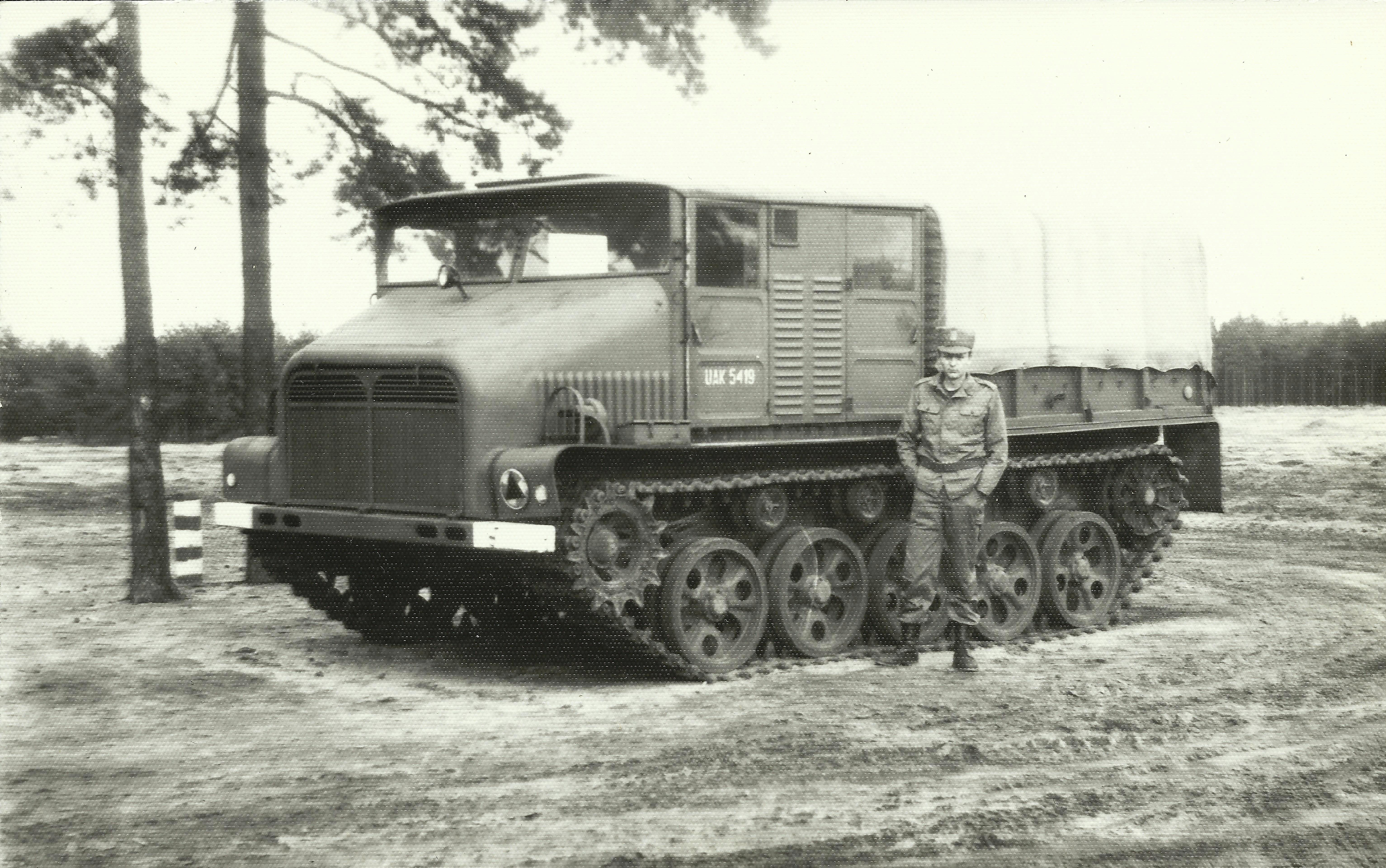 Żołnierz Żandarmerii Wojskowej na tle ciągnika artyleryjskiego Mazur D-350 nr rej. UAK 5419. Plac taktyczny Joanna na terenie OSPWL Żagań. Ciągnik pozostawał na ewidecji JW 5430 Dobra nad Kwisą.